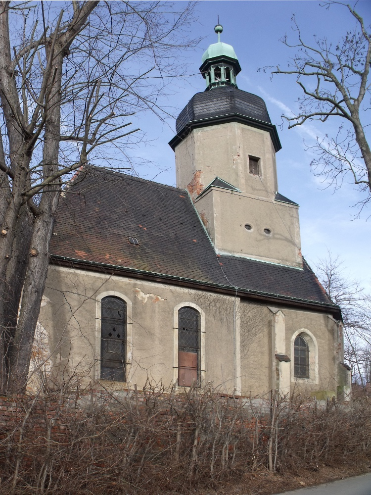 Kirche in Imnitz/Zwenkau bei Leipzig